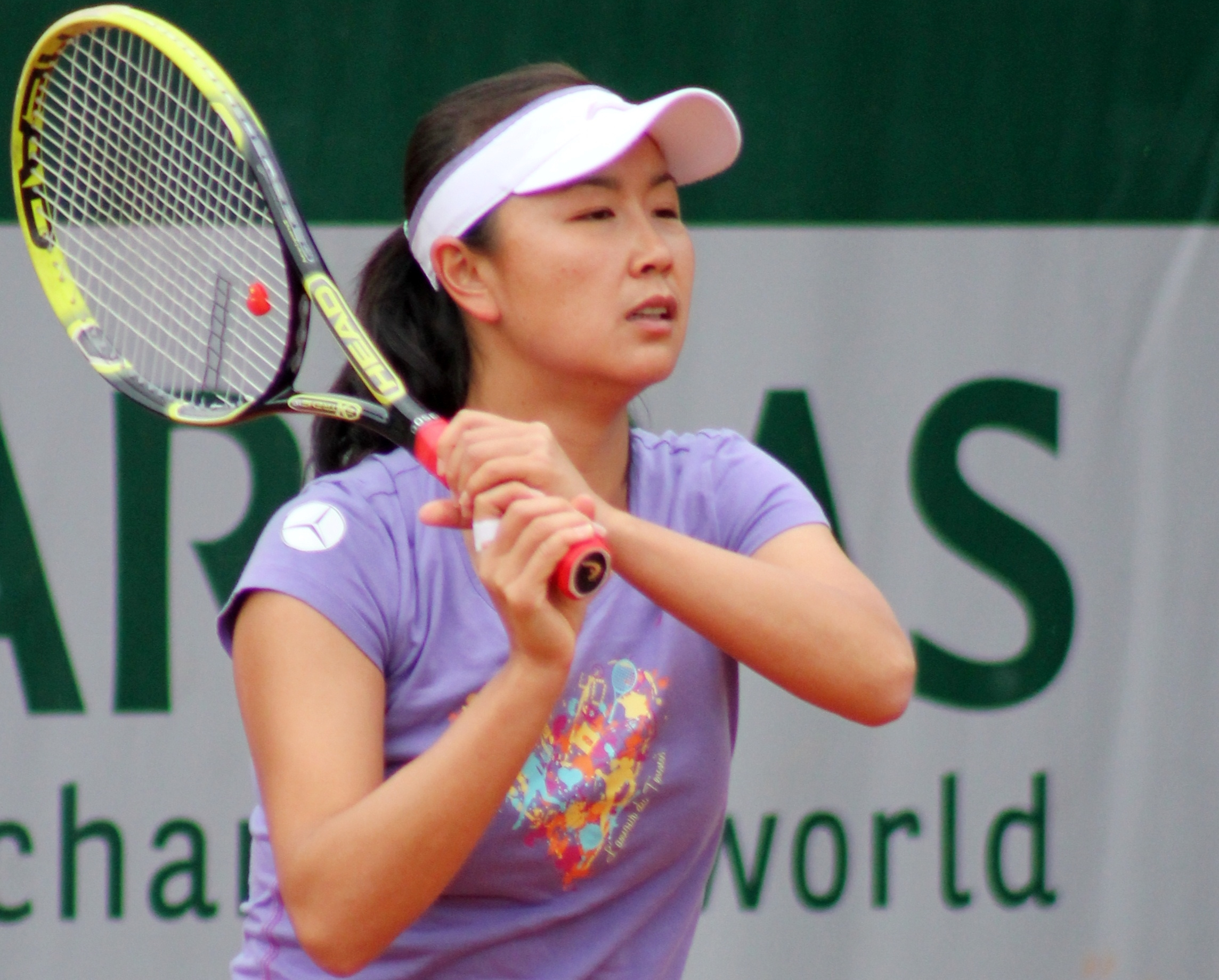 Peng RG13 (4)